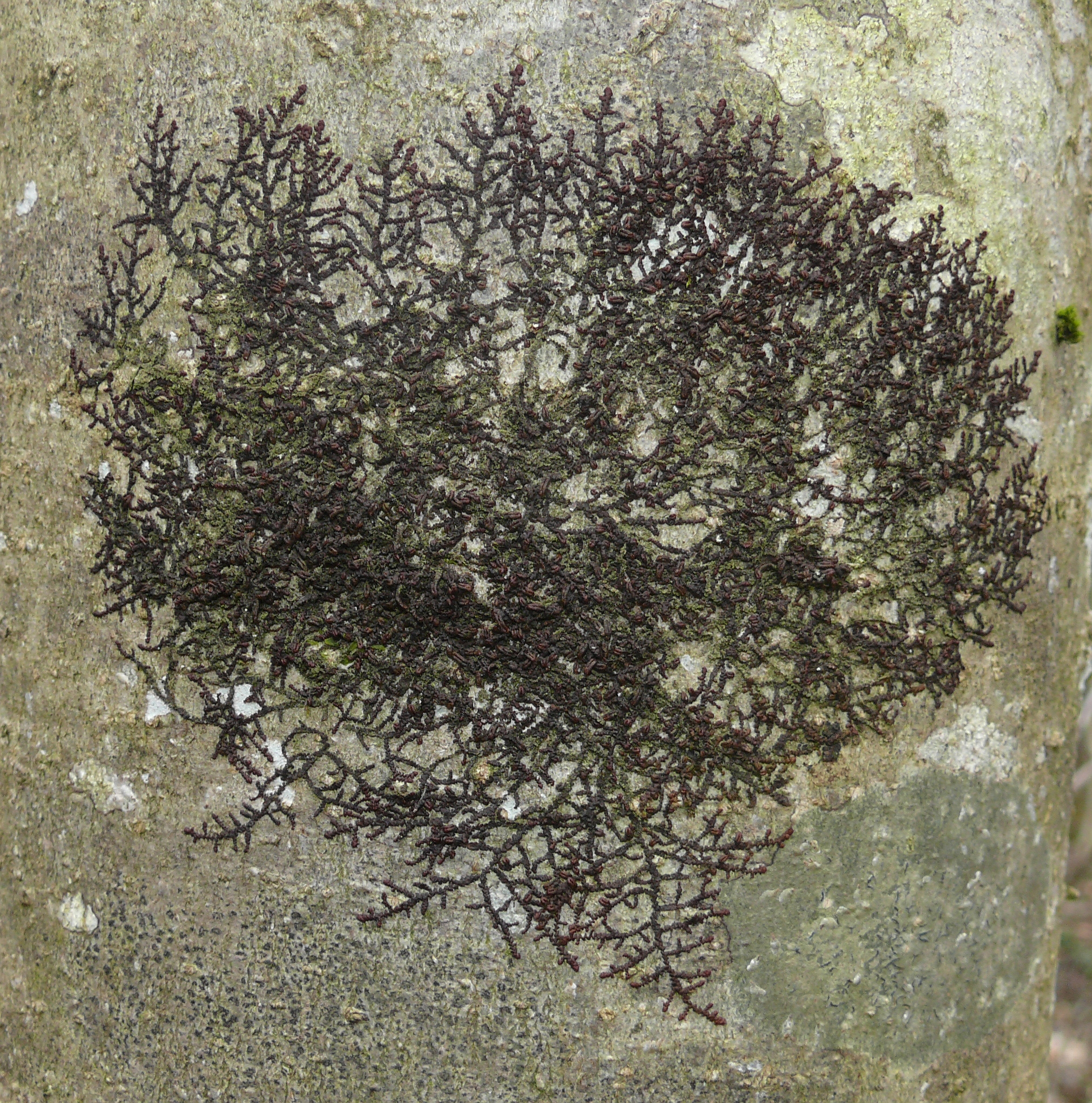 Frullania fragilifolia, Schwäbisch-Fränkische Waldberge, Germany